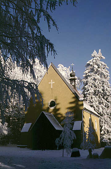 Niklaskirche im Grenzwald zwischen Neualbenreuth und Mähring